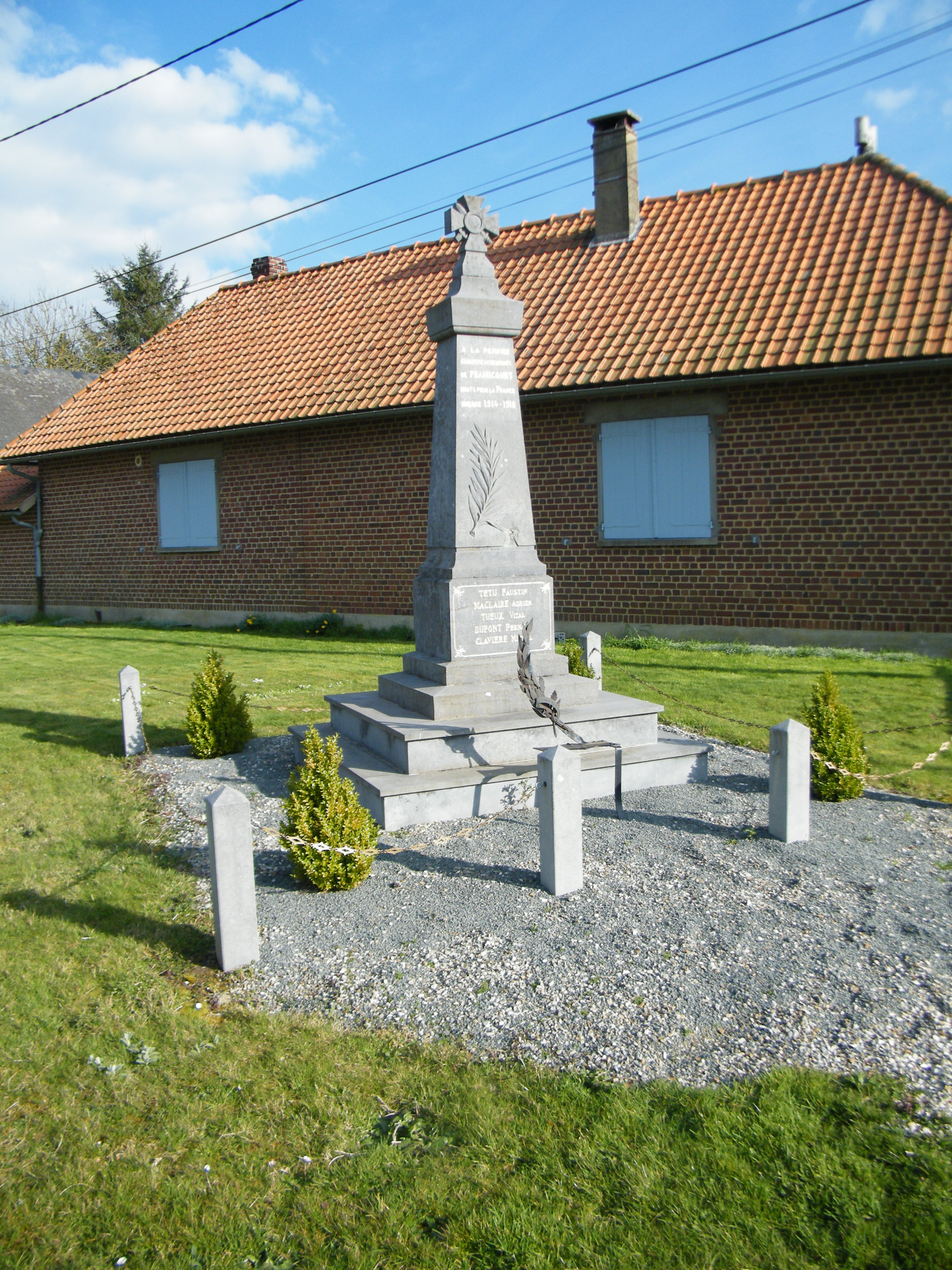 Le monument aux morts pour la patrie.